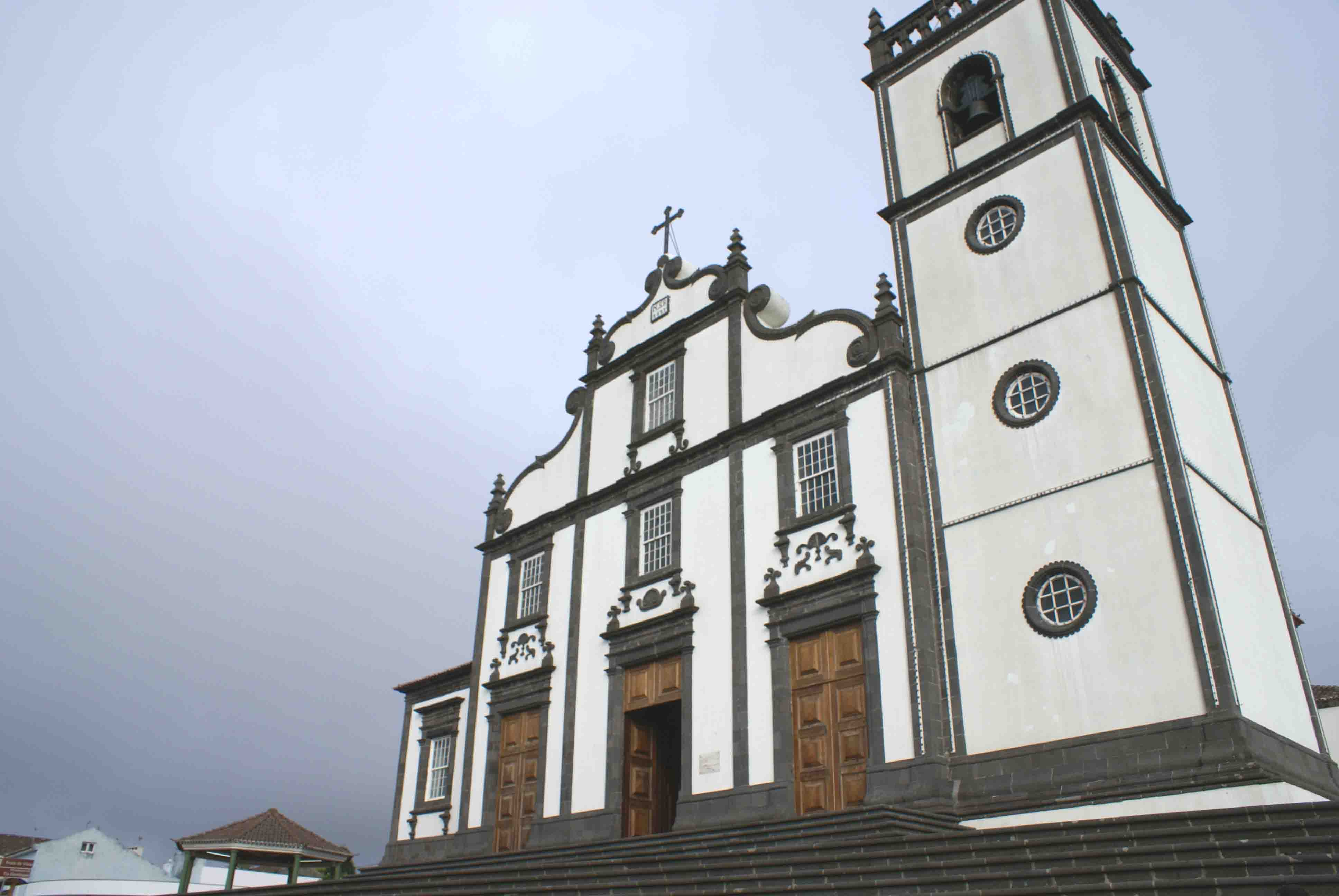 Exterior da Igreja de Nossa Senhora do Rosário da Lomba da Maia